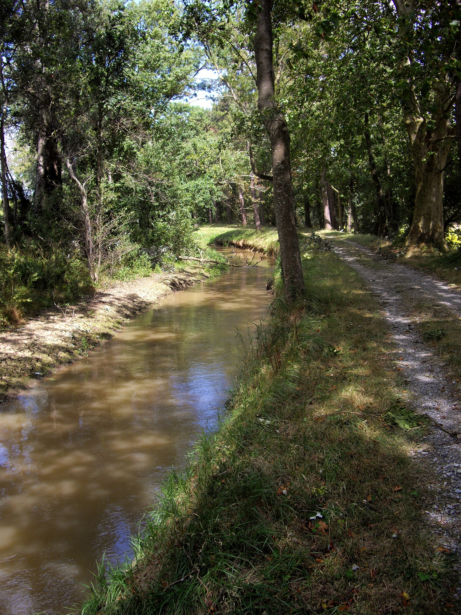 Rigole de la plaine